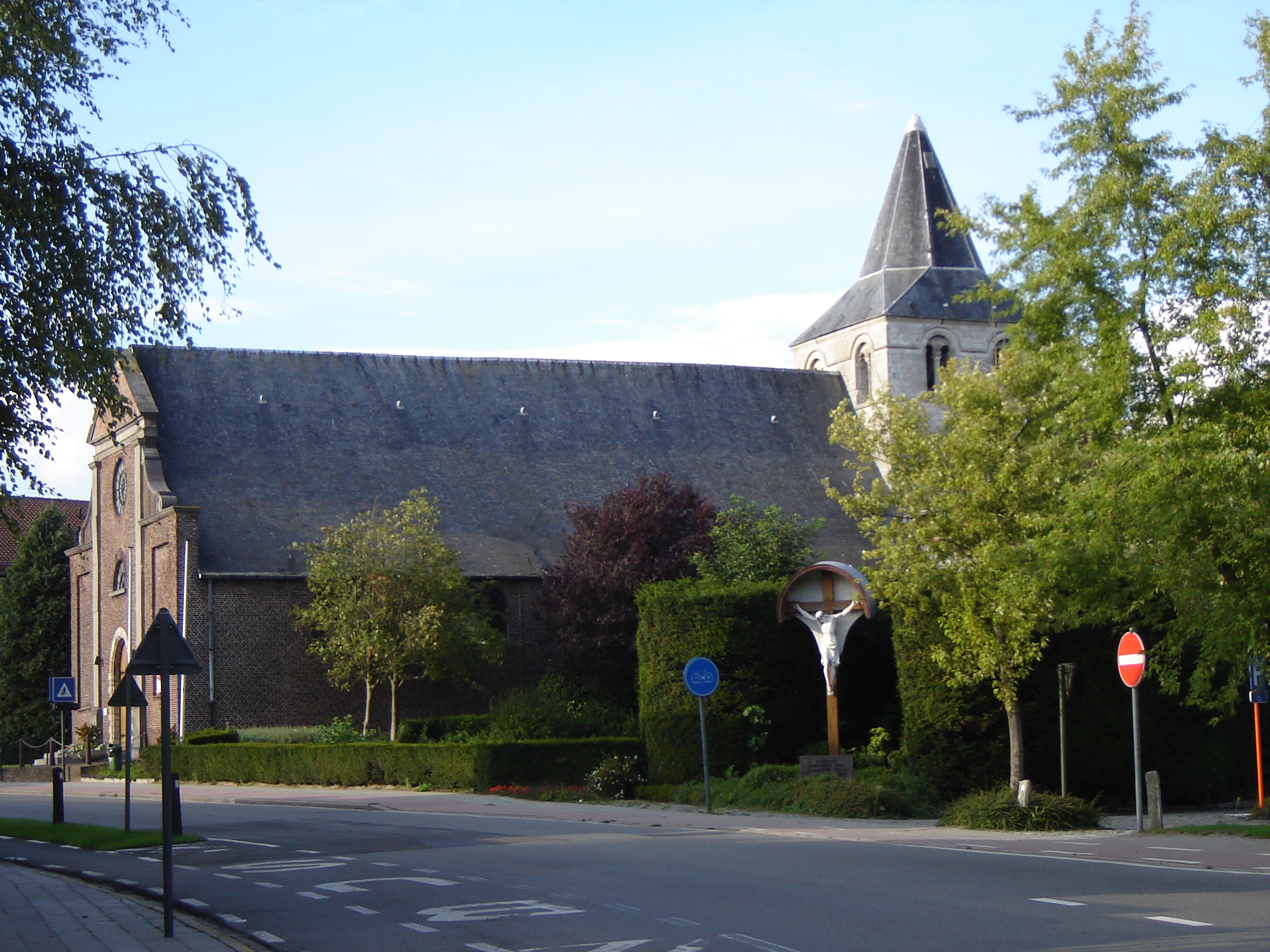 Sint-Niklaaskerk (church) in Rekkem, Menen, West-Flanders, Belgium